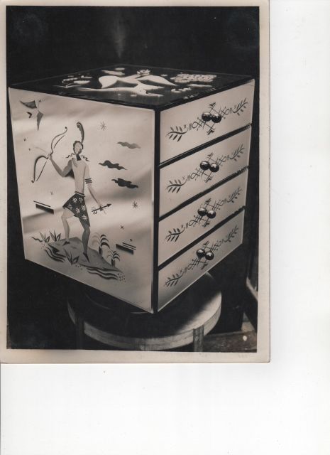 Petit meuble à fards avec panneaux en glace gravée, avec scènes et quatre tiroirs, de Pierre Lardin.